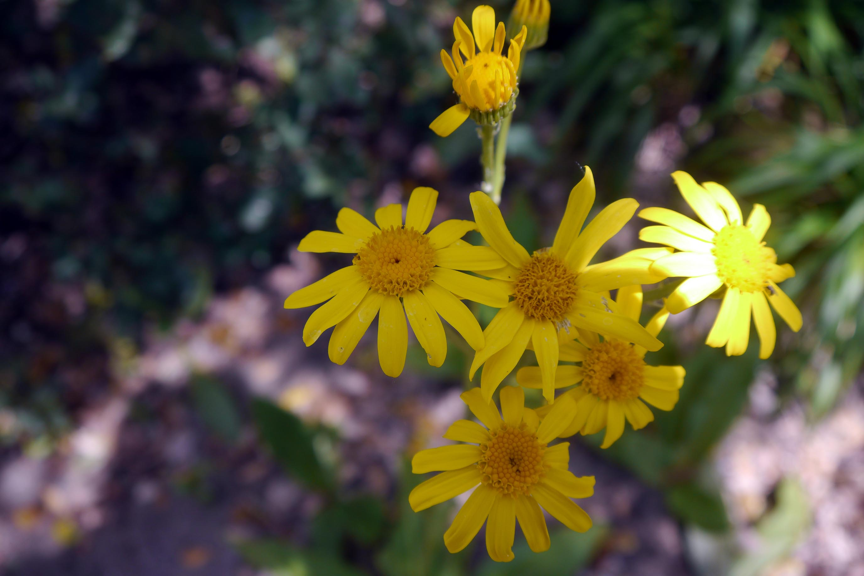 Senecio lopezii en el Jardín Botánico de El Aljibe en Alcalá de los Gazules, Cádiz, España.